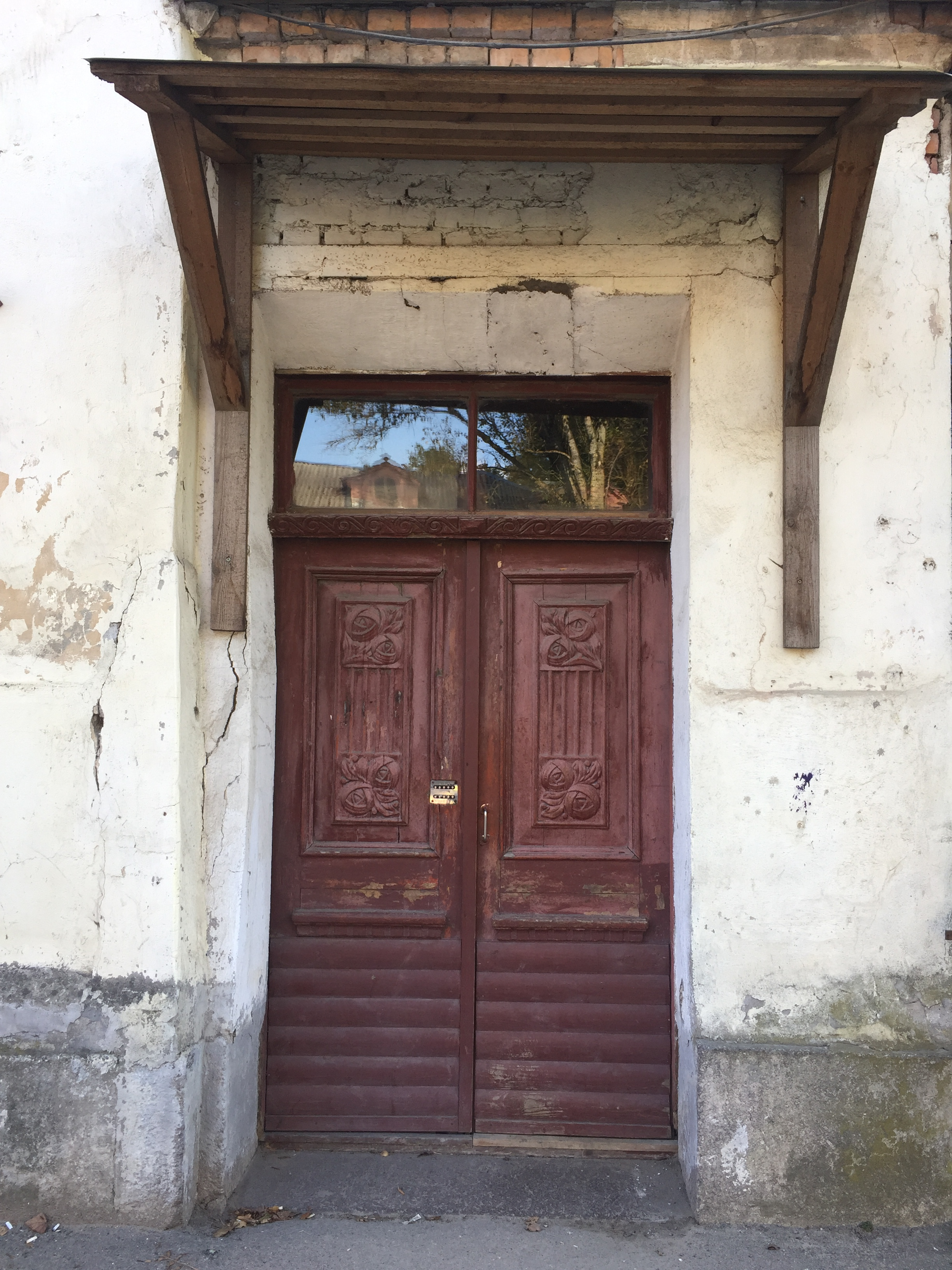 Фабрика канатная Мейера (Дом Мейера, нач.ХХ в.): улица Леона Поземского, 22, Псков, Псковская область